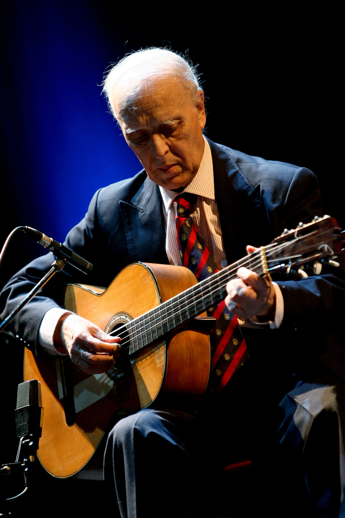 Fernando Alvim